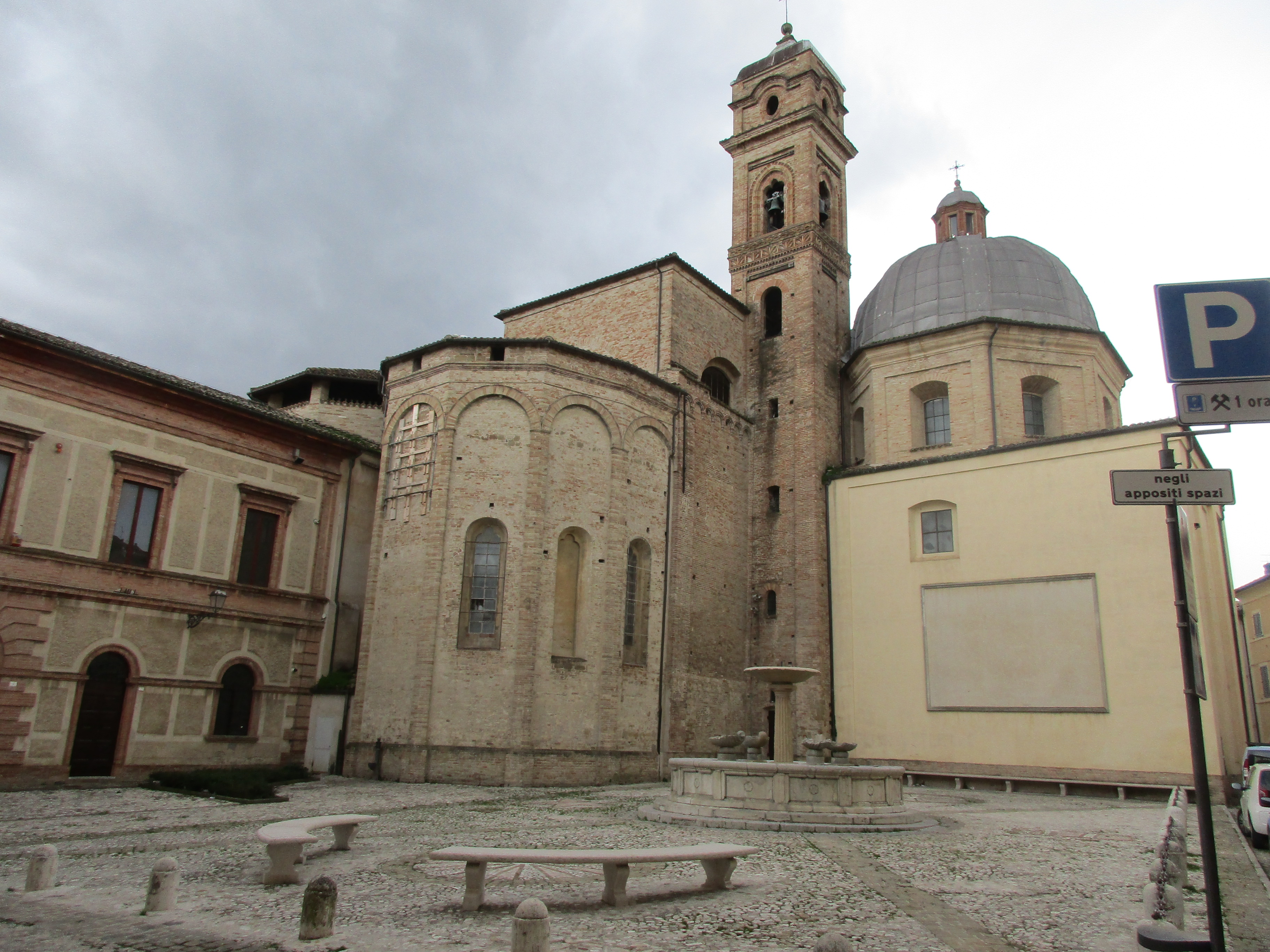 Tolentino: Basilica di San Nicola - Abside (dicembre 2017)